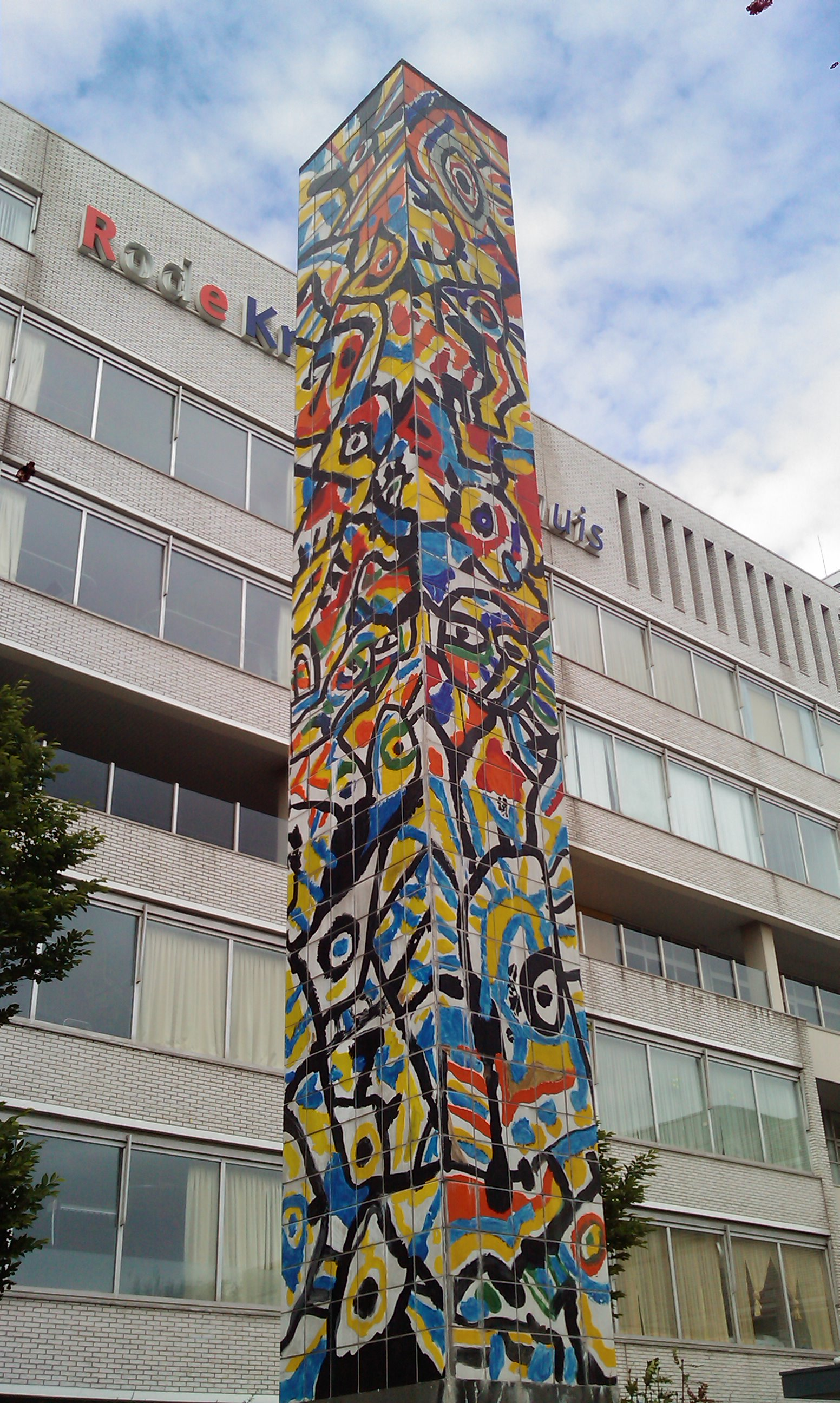 Werk: onbekend; Kunstenaar: Lucebert; Jaar: Onbekend; Straat: Vondellaan; Materiaal: Keramische tegels